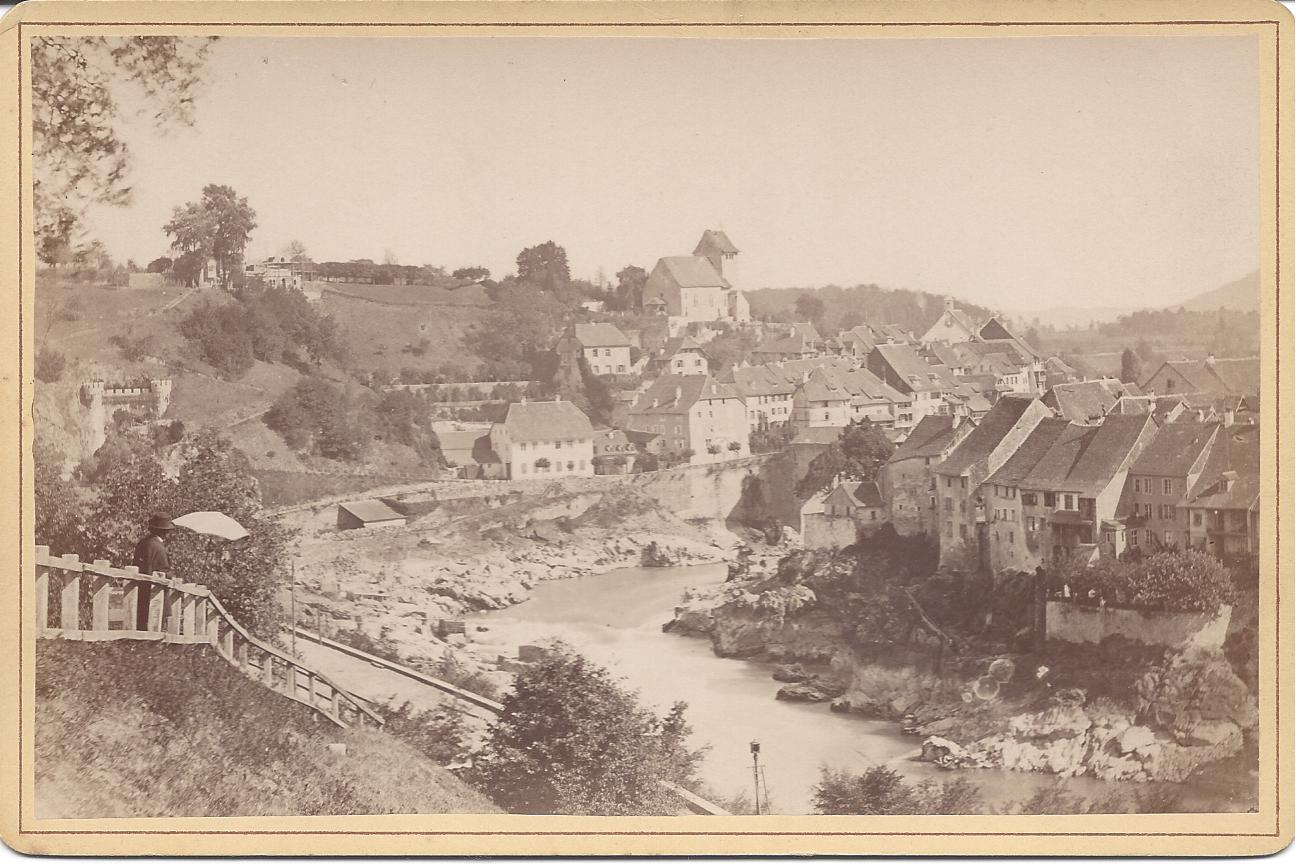 Das linksrheinische Laufenburg (Baden) 1864, späterer Abzug handschriftlich auf der Rückseite 23. Juli 1881 datiert. Foto des Ateliers G. Th. Hase aus Freiburg im Breisgau (Vgl. Laufenburg - Bilder erzählen Geschichten, Binkert, Laufenburg, 2007. Dort auf Seite 6 irrig als älteste Fotoaufnahme Laufenburgs bezeichnet. Das Foto zeigt das rechtsrheinische Laufenburg vor den tiefgreifenden Veränderungen der folgenden Jahrzehnte vom Rheinblick aus aufgenommen. Hervorzuheben sind auf dieser Aufnahme die mittelalterliche 1882 abgebrochene Heiliggeist-Kirche, der 1910 gesprengte Laufen, die abgetragene rechtsrheinische überdachte Holzbrücke und der im Bau befindliche Vorgängerbau des "Schlössles" für den Basler Fabrikanten La Roche.